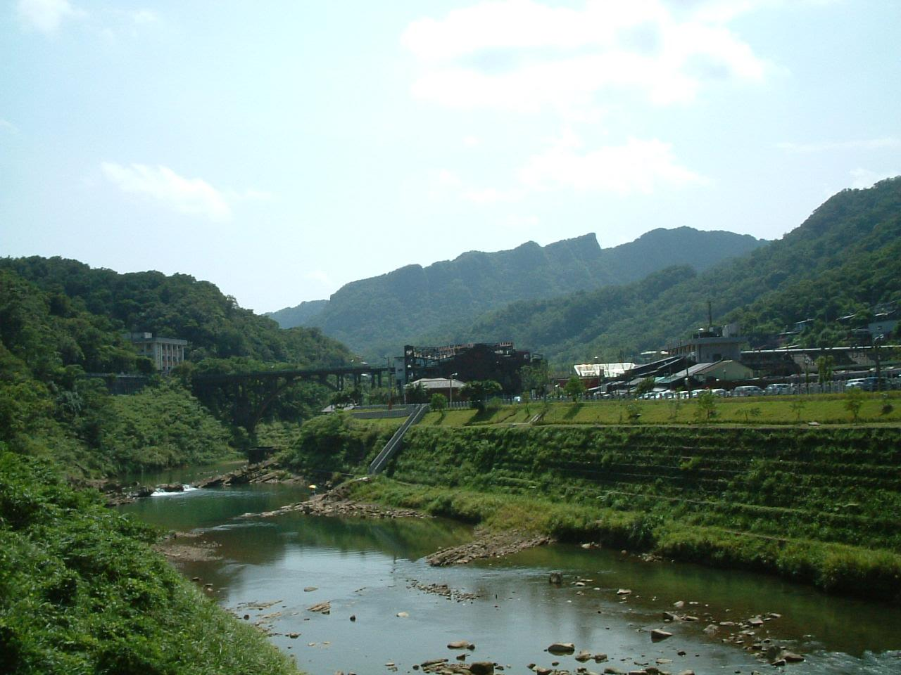 猴硐煤礦博物園區